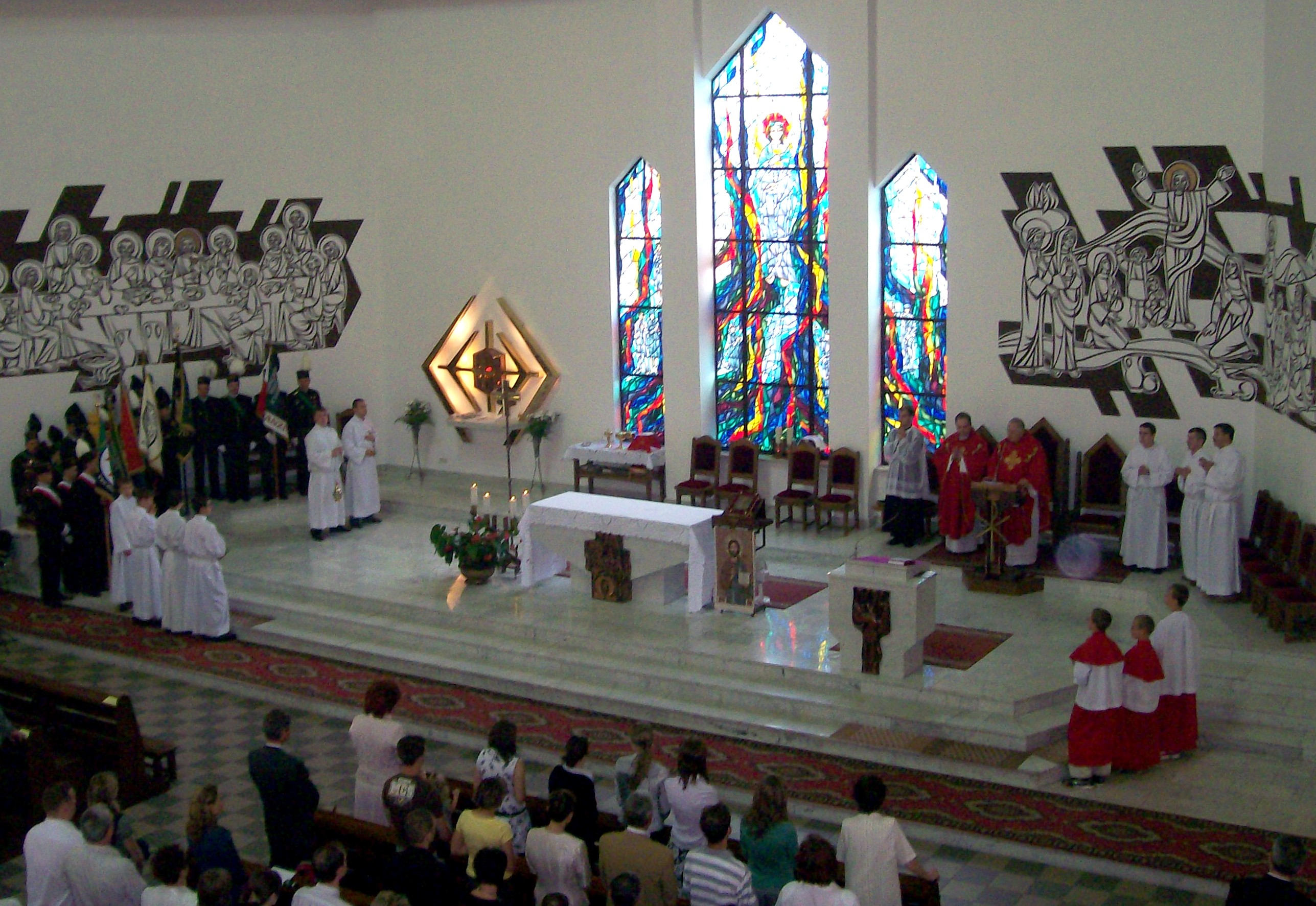 Uroczysta msza św. w dniu 29.06. 2008, w intencji pracowników Katowickiego Holdingu Węglowego - Katowice-Giszowiec, kościół św. Barbary.